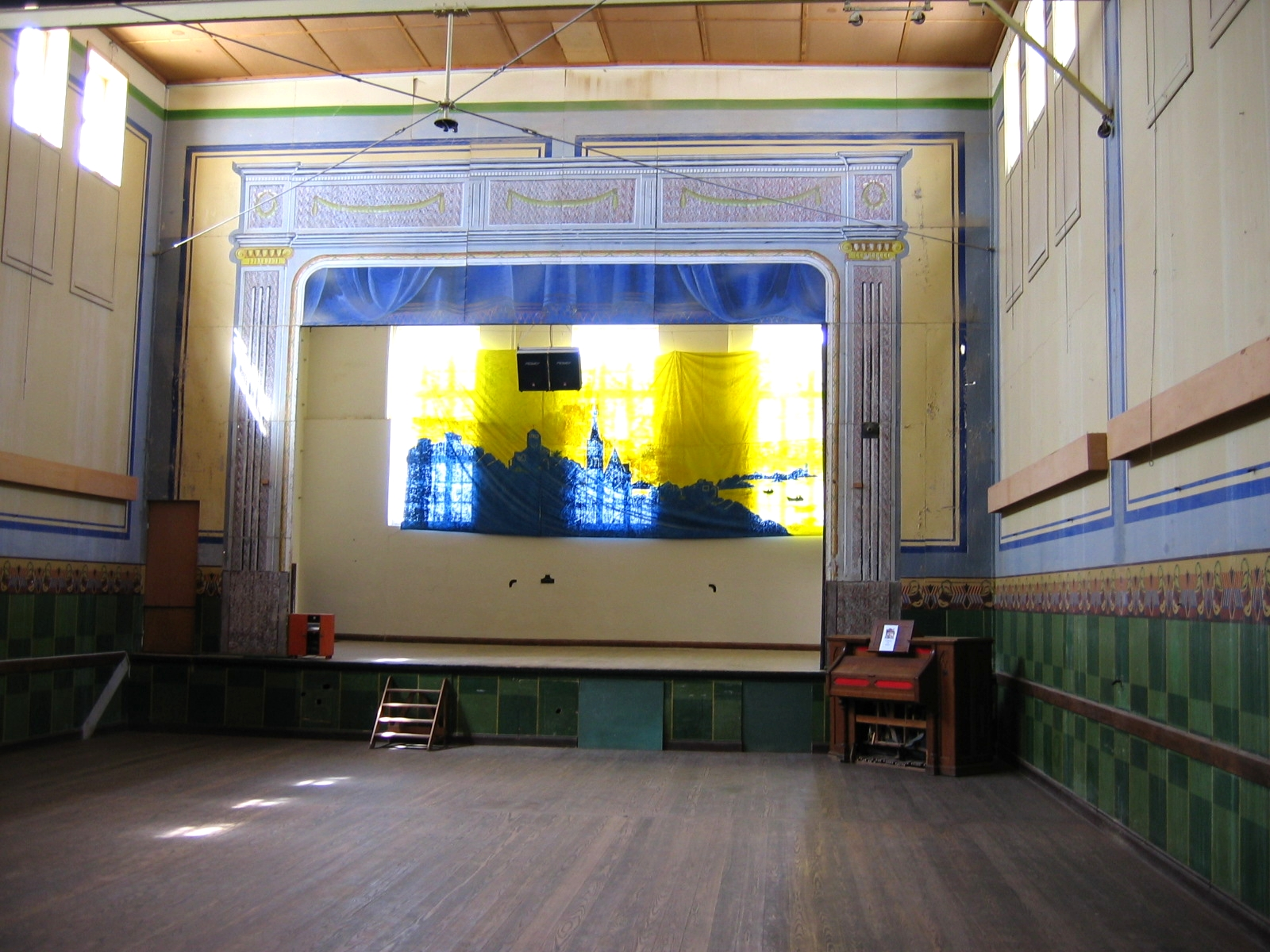 Ballsaal, Kolmannskuppe, Namibia